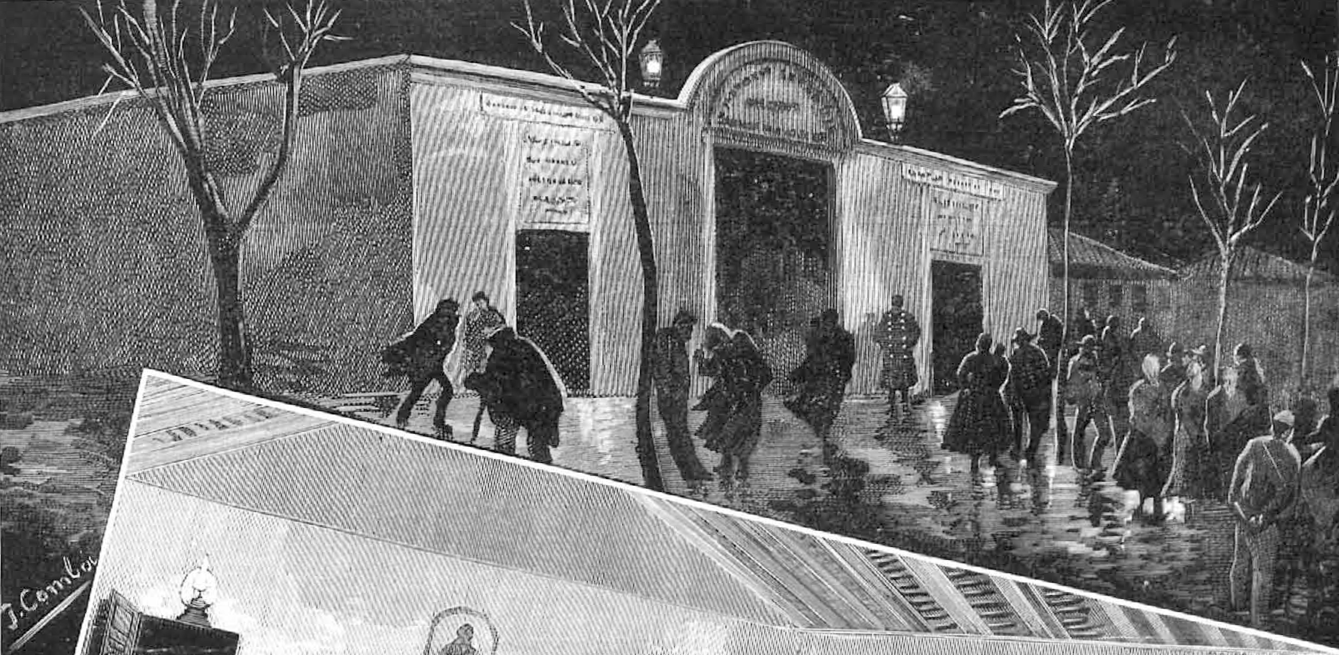 Asilo de San Luis y Santa Cristina, fundado por Manuel María de Santa Ana, para dar albergue de noche á los desvalidos. La hora de entrada.—El comedor.—Un dormitorio.—(Dibujo del natural, por Comba).